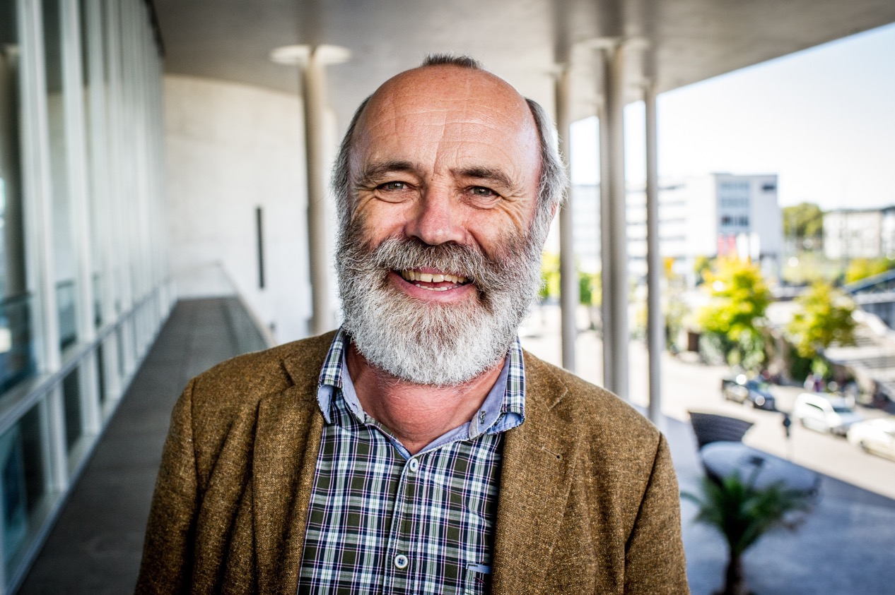 Porträt von Ulrich Martin Drescher